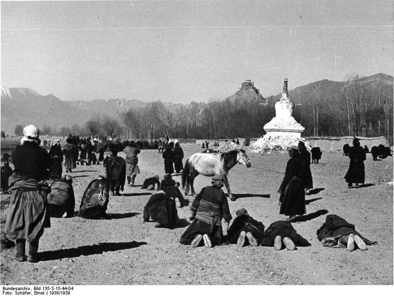 Lhasa, der weiße Tschorten, Bauchrutscher